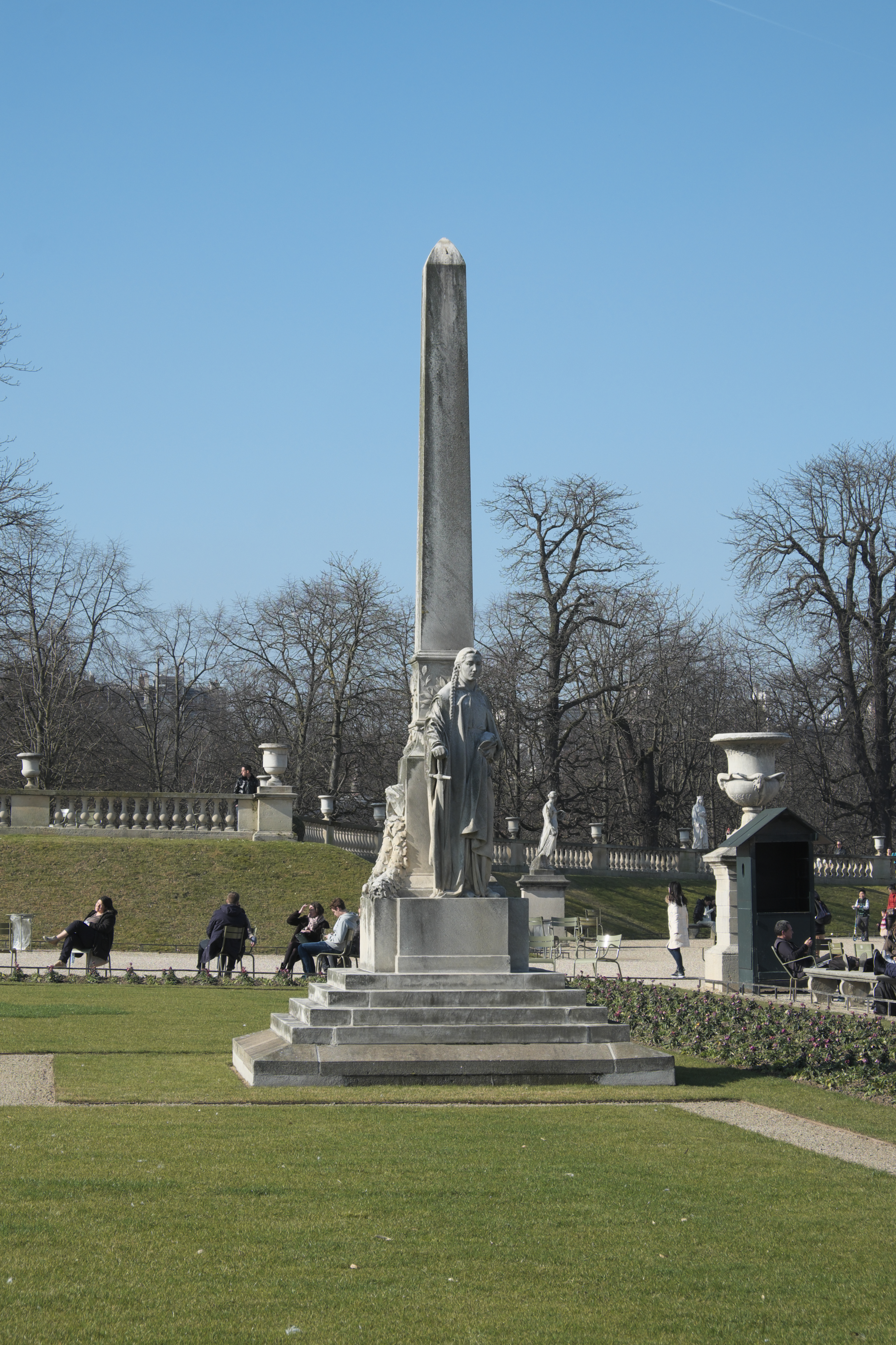 Monument für Auguste Scheurer-Kestner von Jules Dalou im Jardin du Luxembourg im 6. Arrondissement in Paris (Île-de-France/Frankreich)